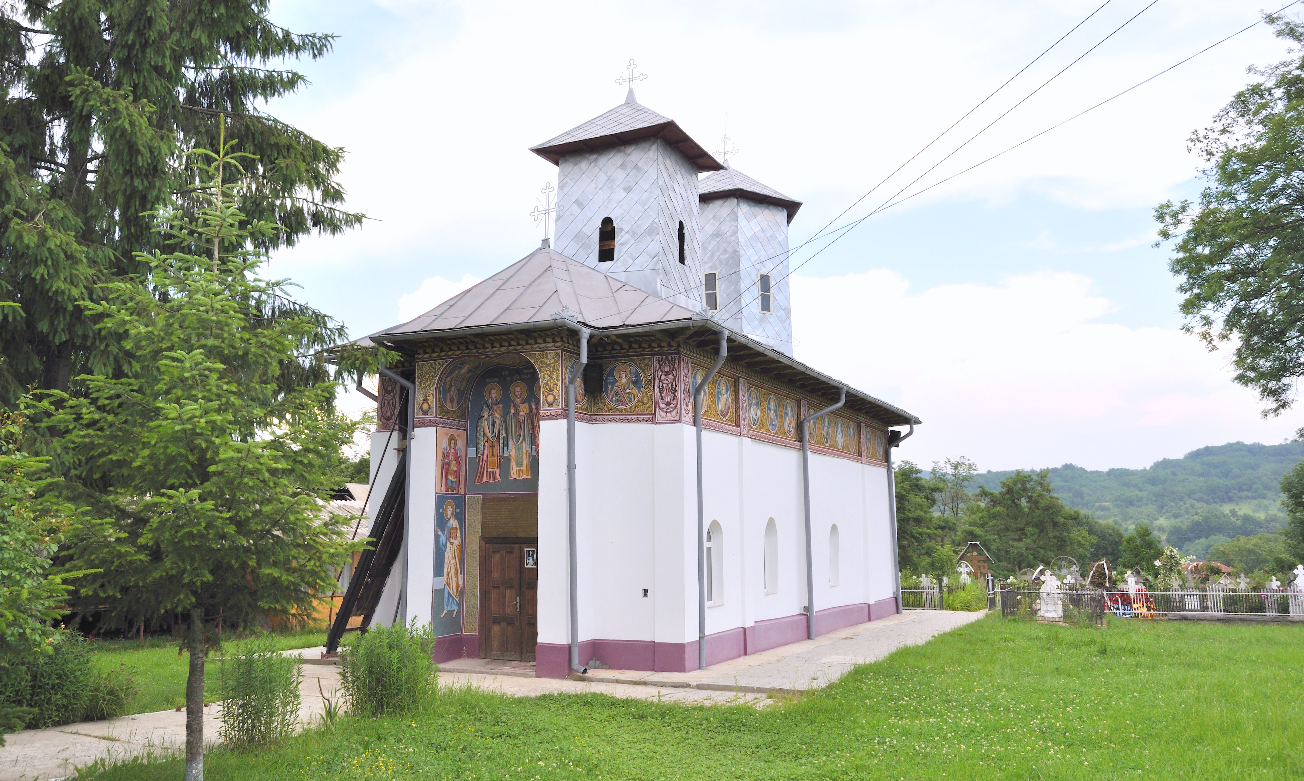 Biserica monument „Sf.Trei Ierarhi” (1767, ref. 1866) din Foleștii de Jos, Vâlcea